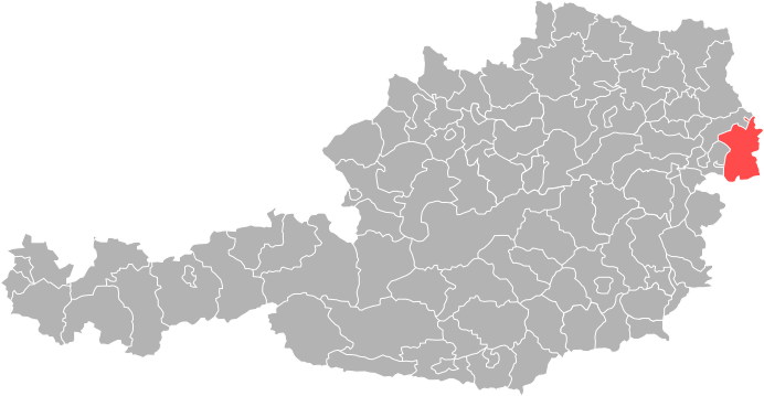 Bezirk Neusiedl am See in Österreich